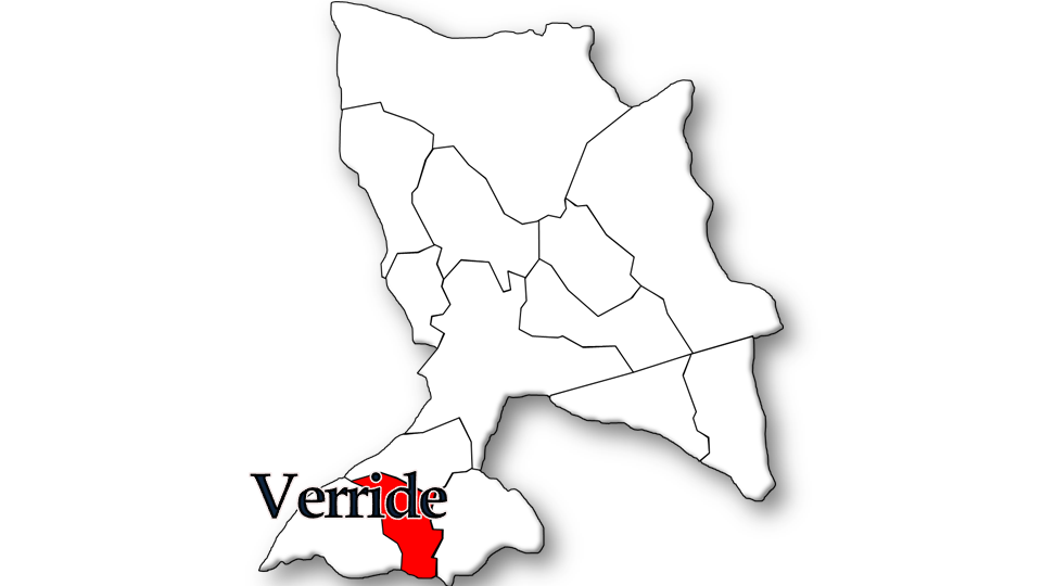 População